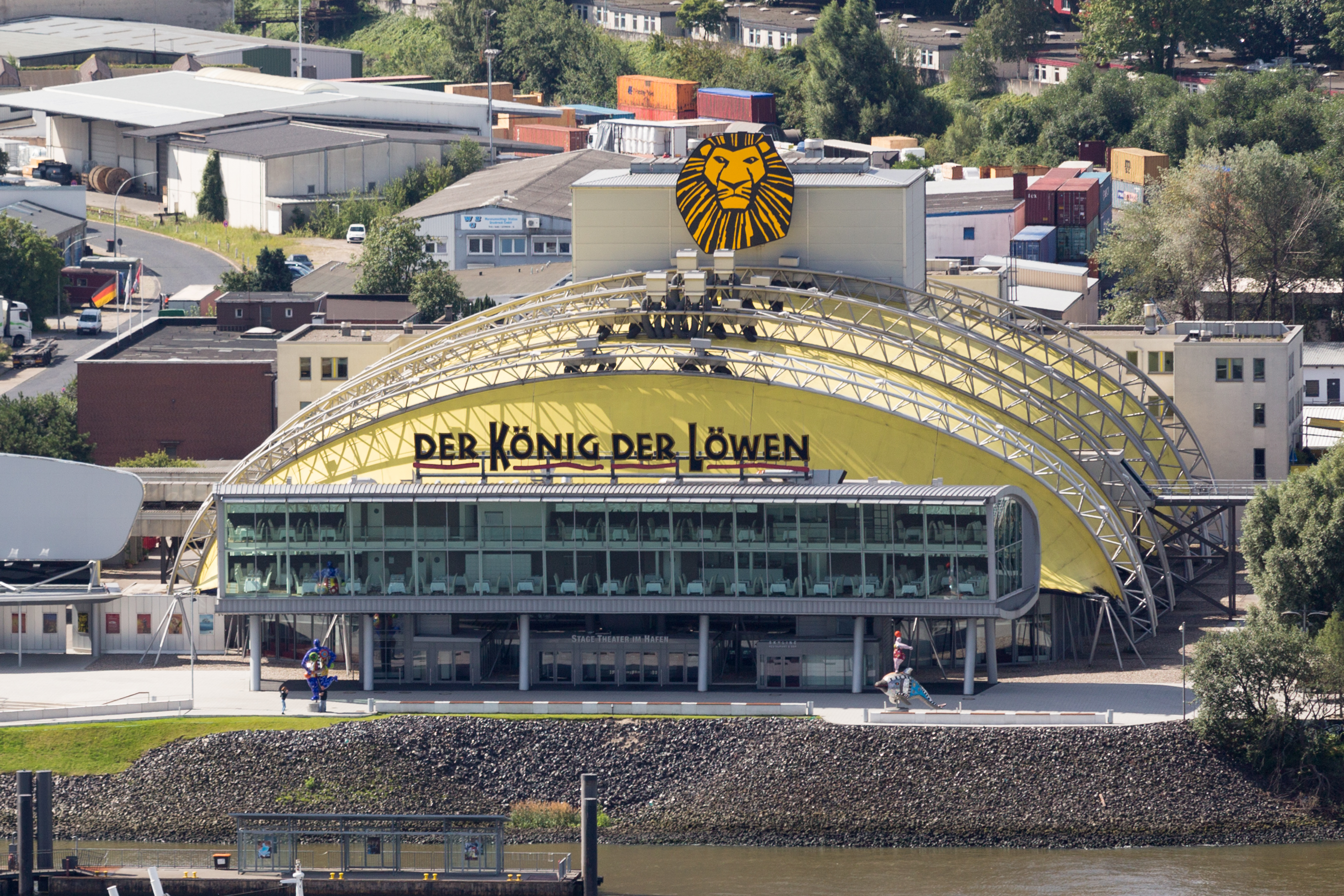 Theater im Hafen Hamburg, Heimat von "König der Löwen"